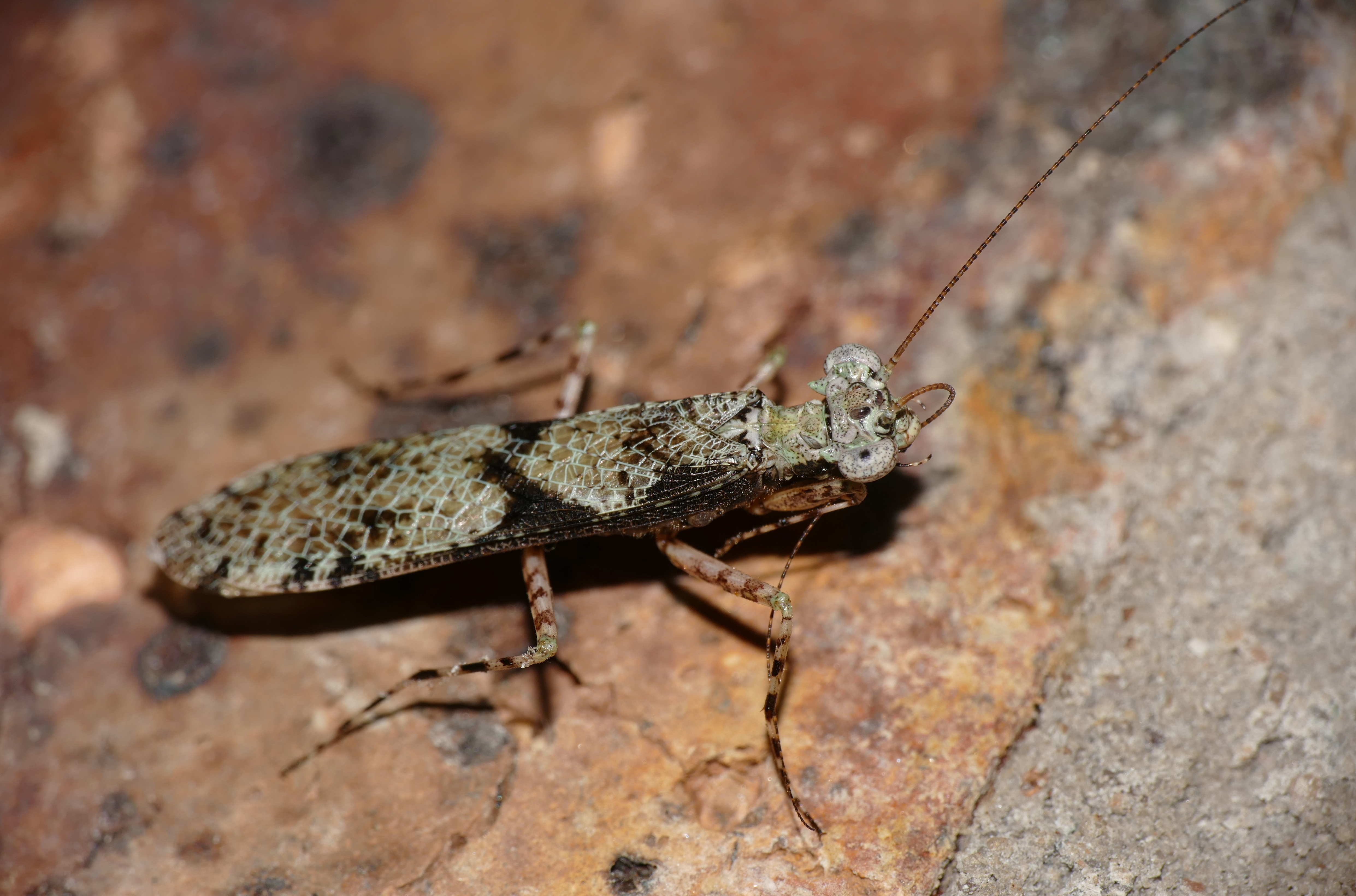 Berg-en-Dal Camp, Kruger NP, SOUTH AFRICA